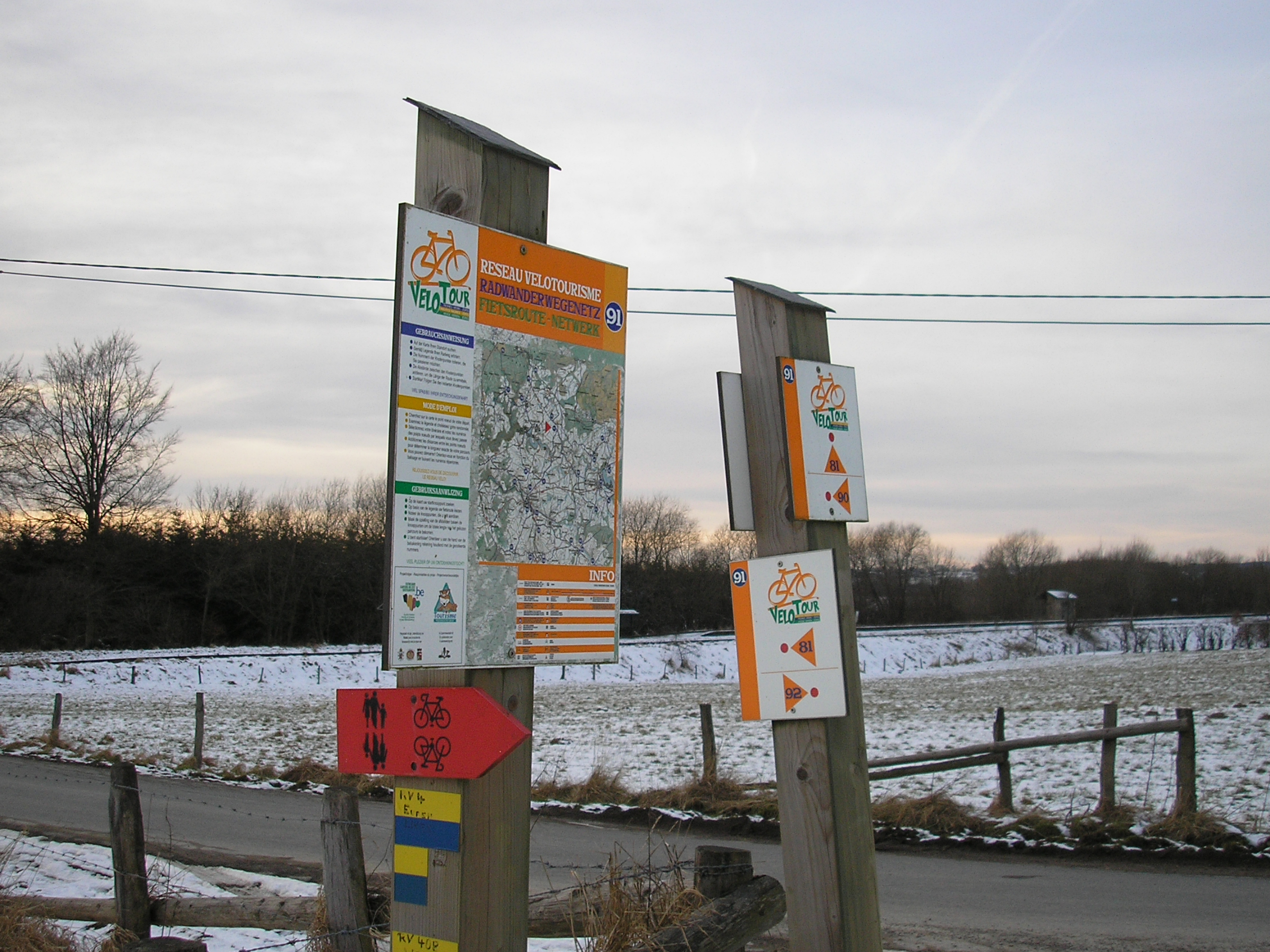 Knotenpunkt 91, Noir Thier, Weismes, East Belgium